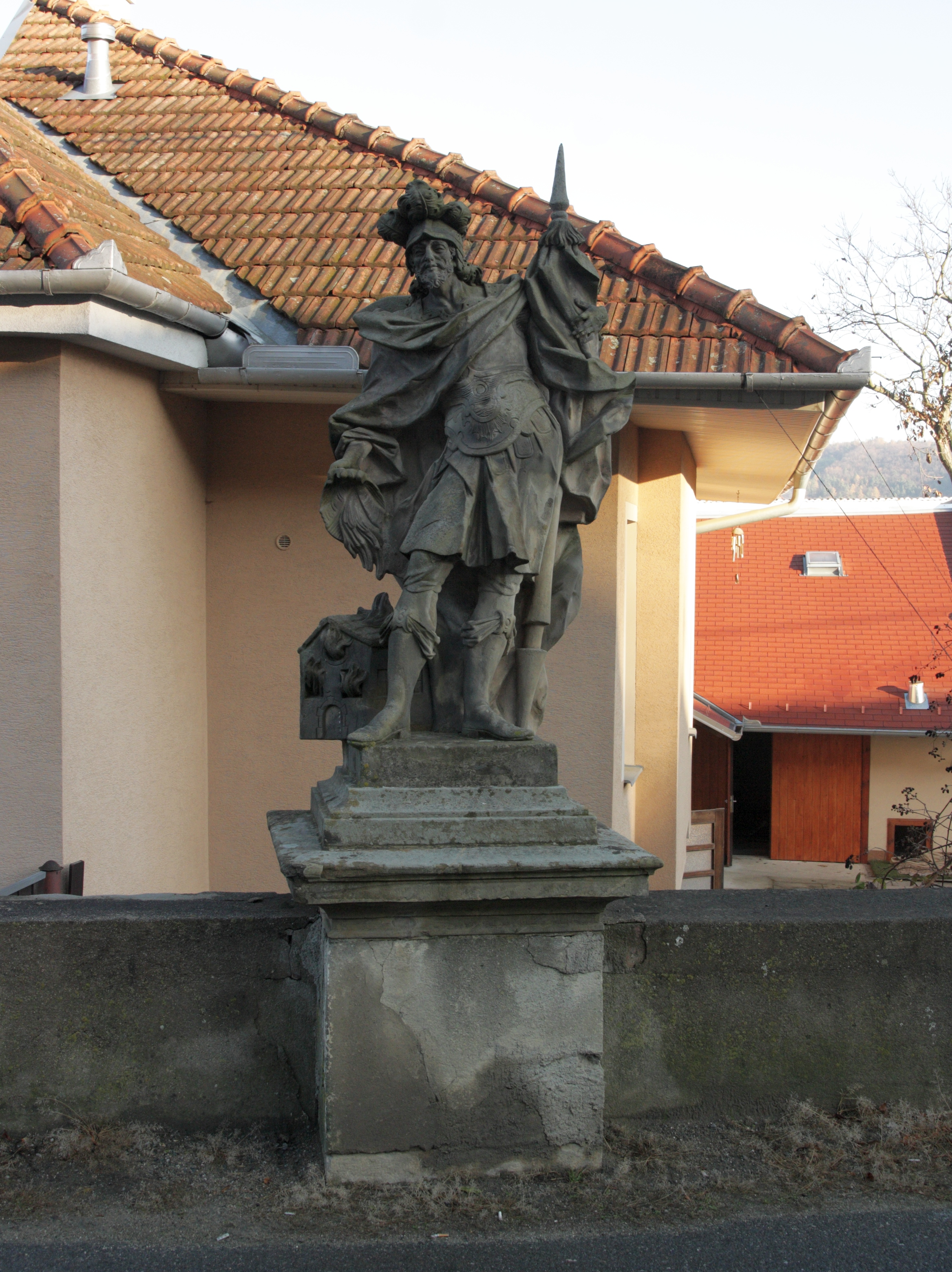 Račice (Račice-Pístovice) - socha sv. Floriána na mostě